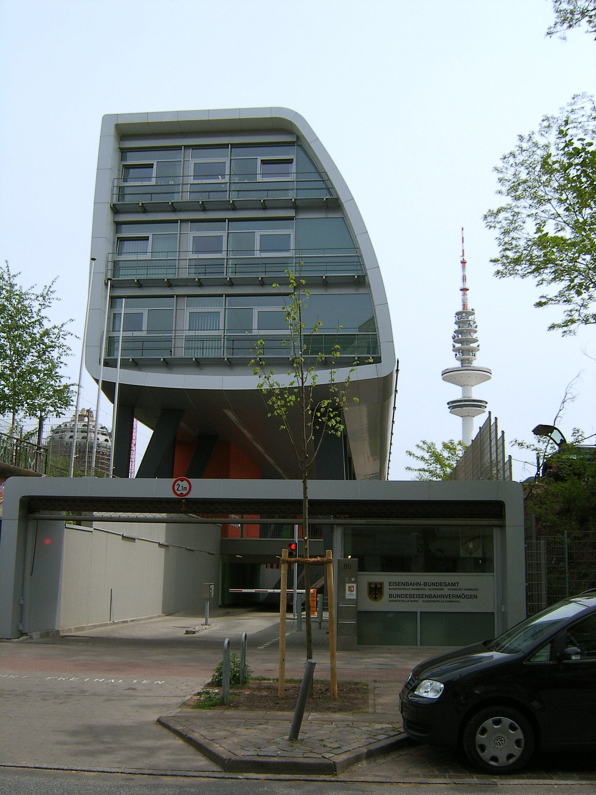 Dienststelle des Eisenbahnbundesamtes im Schanzenviertel in Hamburg.